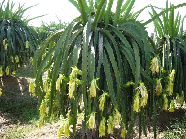 Self made picture.